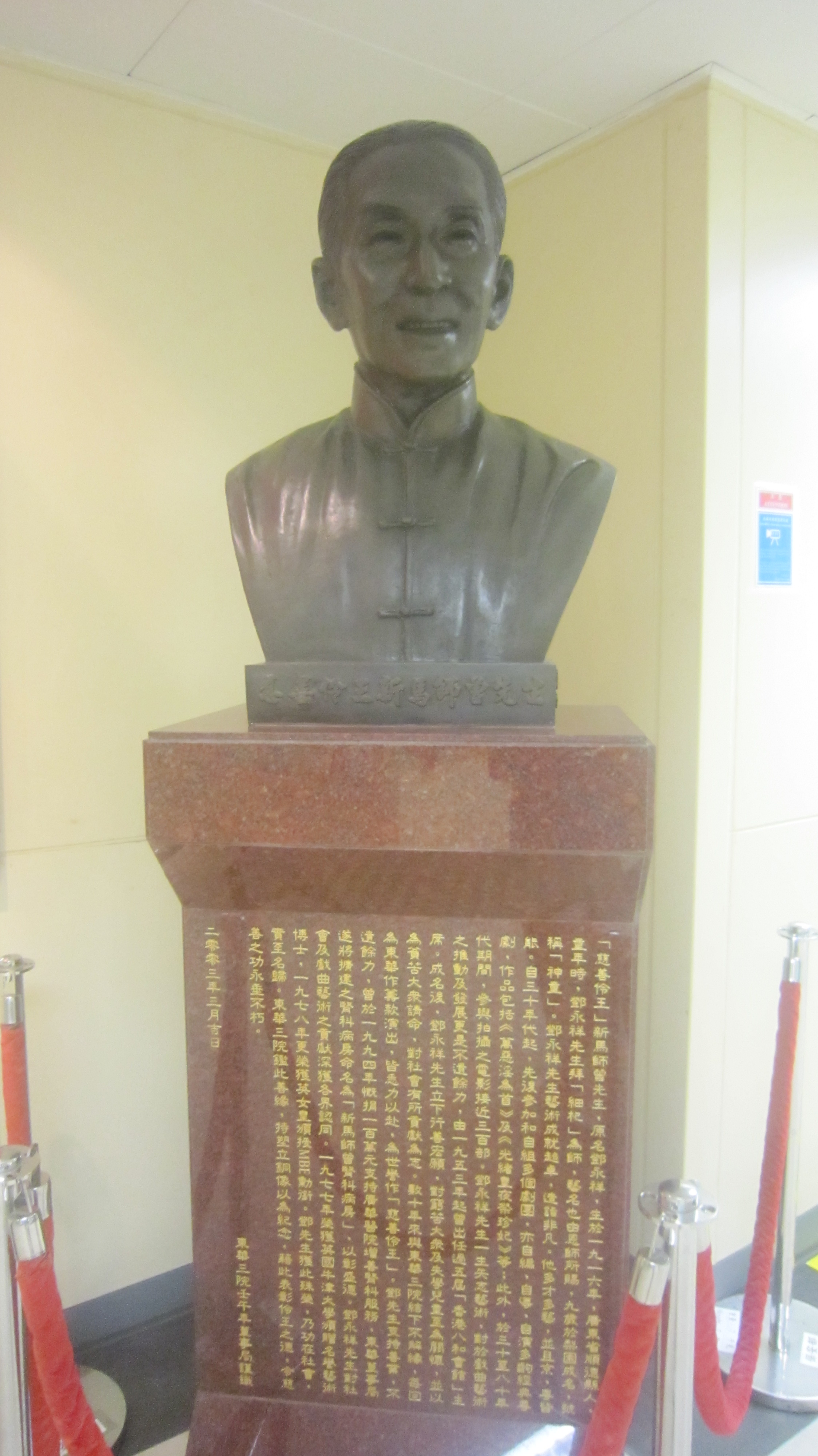 Sun Ma Sze Tsang em Hospital Kwong Wah